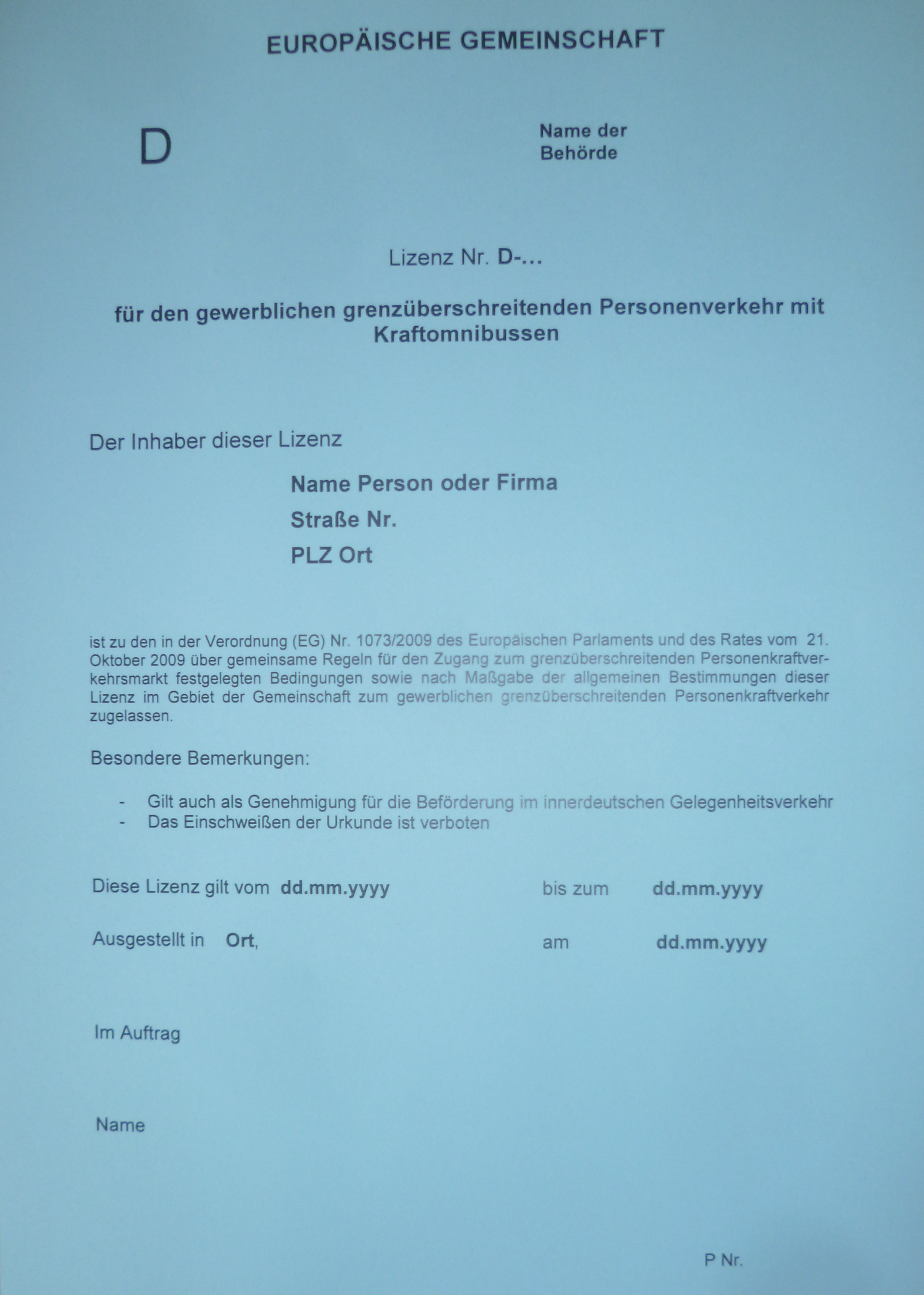 EU Gemeinschaftslizenz für den gewerblichen grenzüberschreitenden Personenverkehr mit Kraftomnibussen